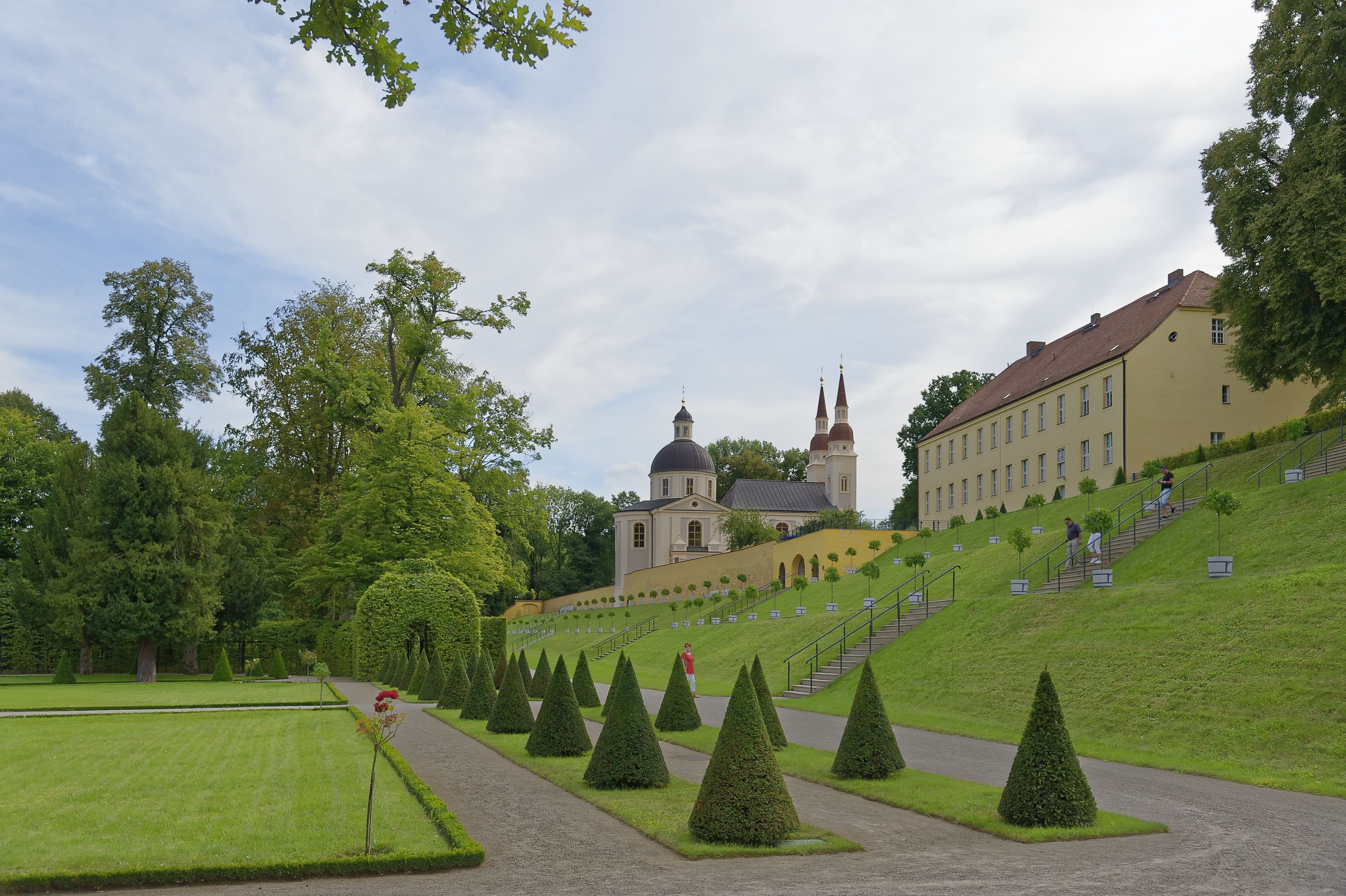 Kloster Neuzell - 2016